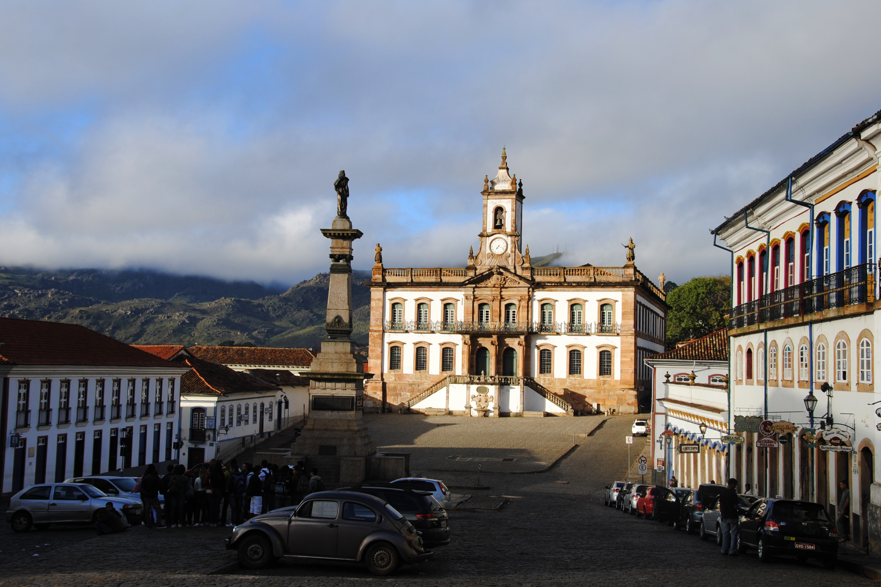 Tiradentes square. Ouro Preto (MG), Brazil.